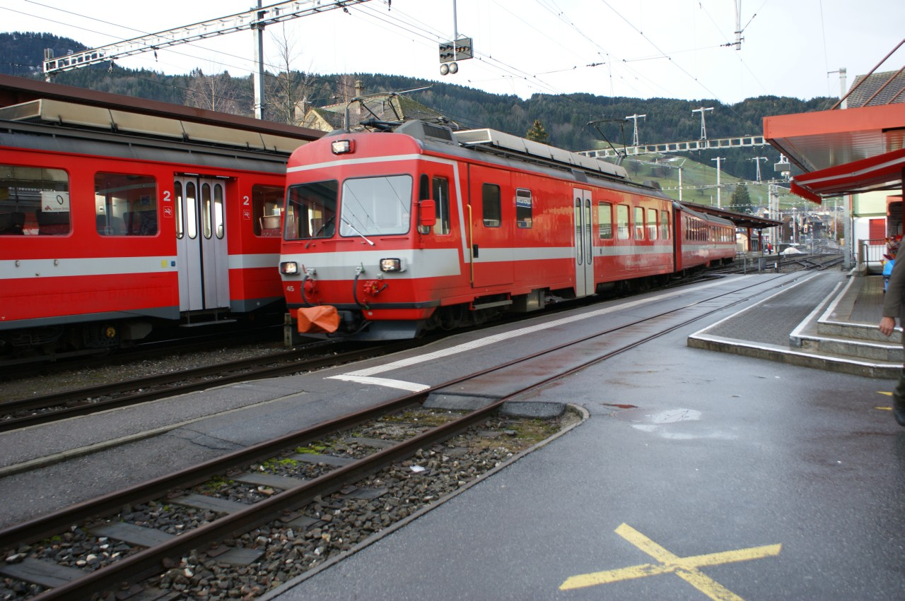 Triebwagen BDe 4/4 45 der Appenzeller Bahnen B 242 und ABt 145 fährt in Appenzell aus Richtung Wasserauen